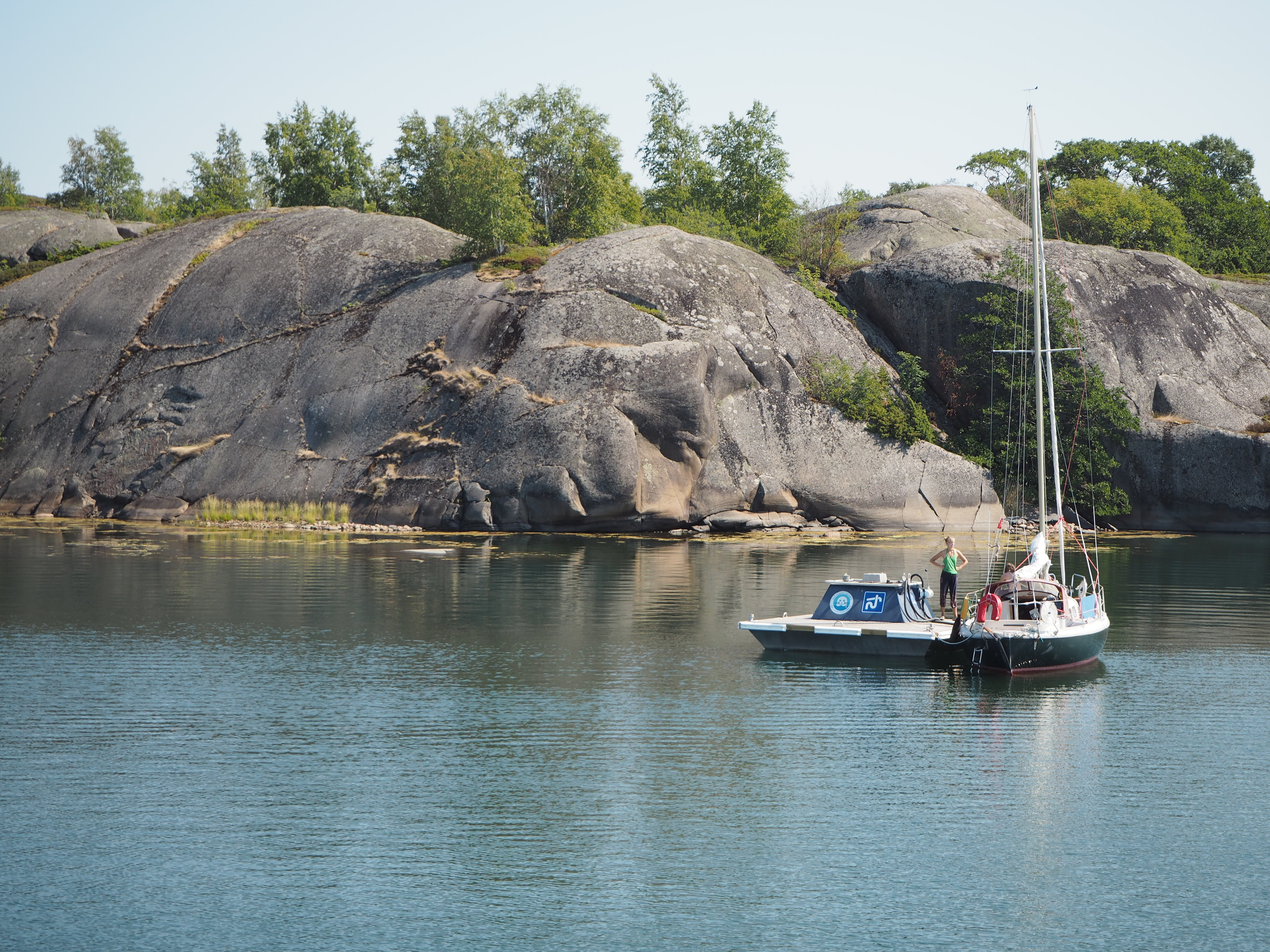 Veneilijä tyhjentämässä käymäläjätteitään PSS ry:n kelluvalla imutyhjennysasemalla